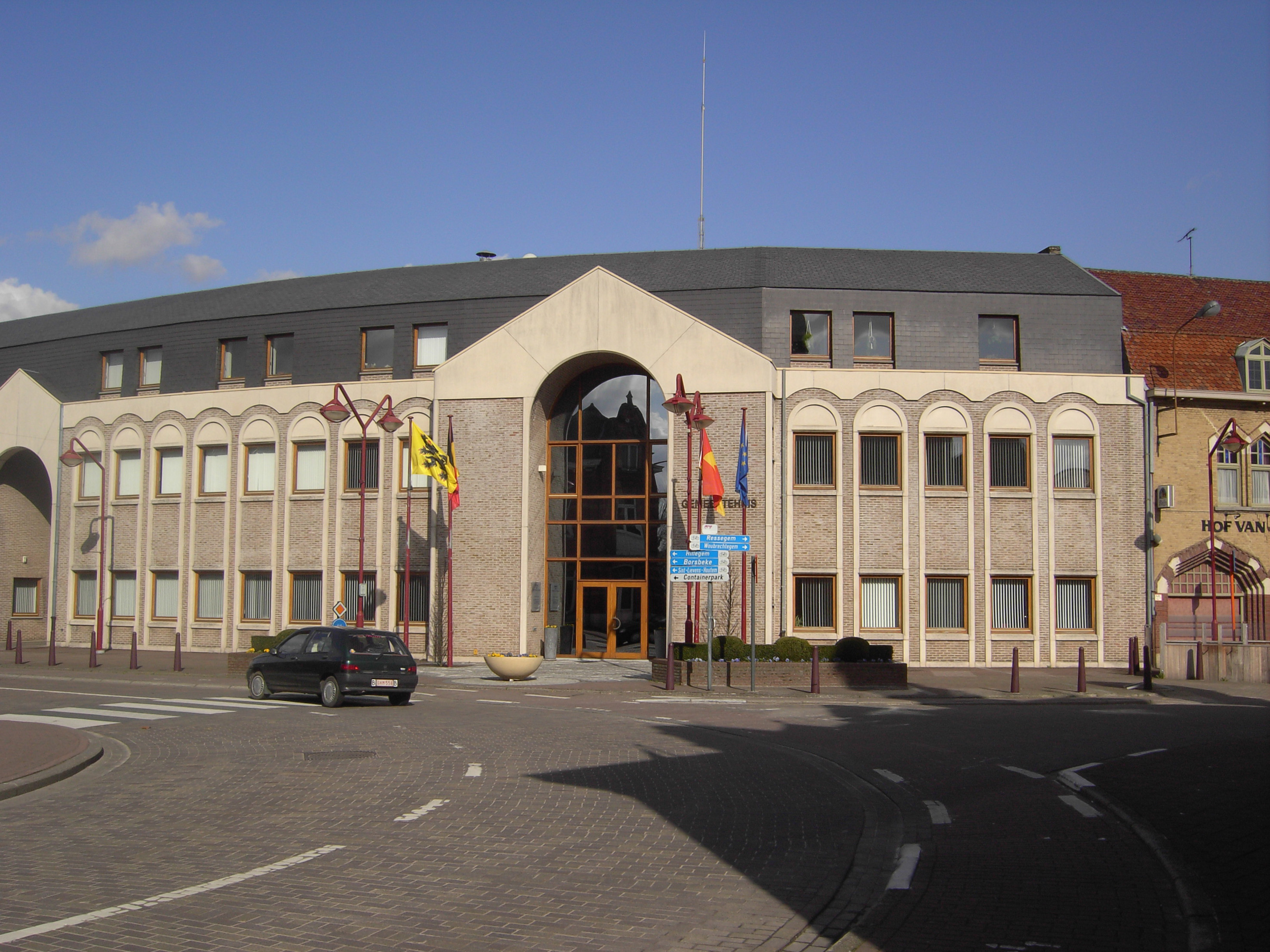 Herzele - Town hall